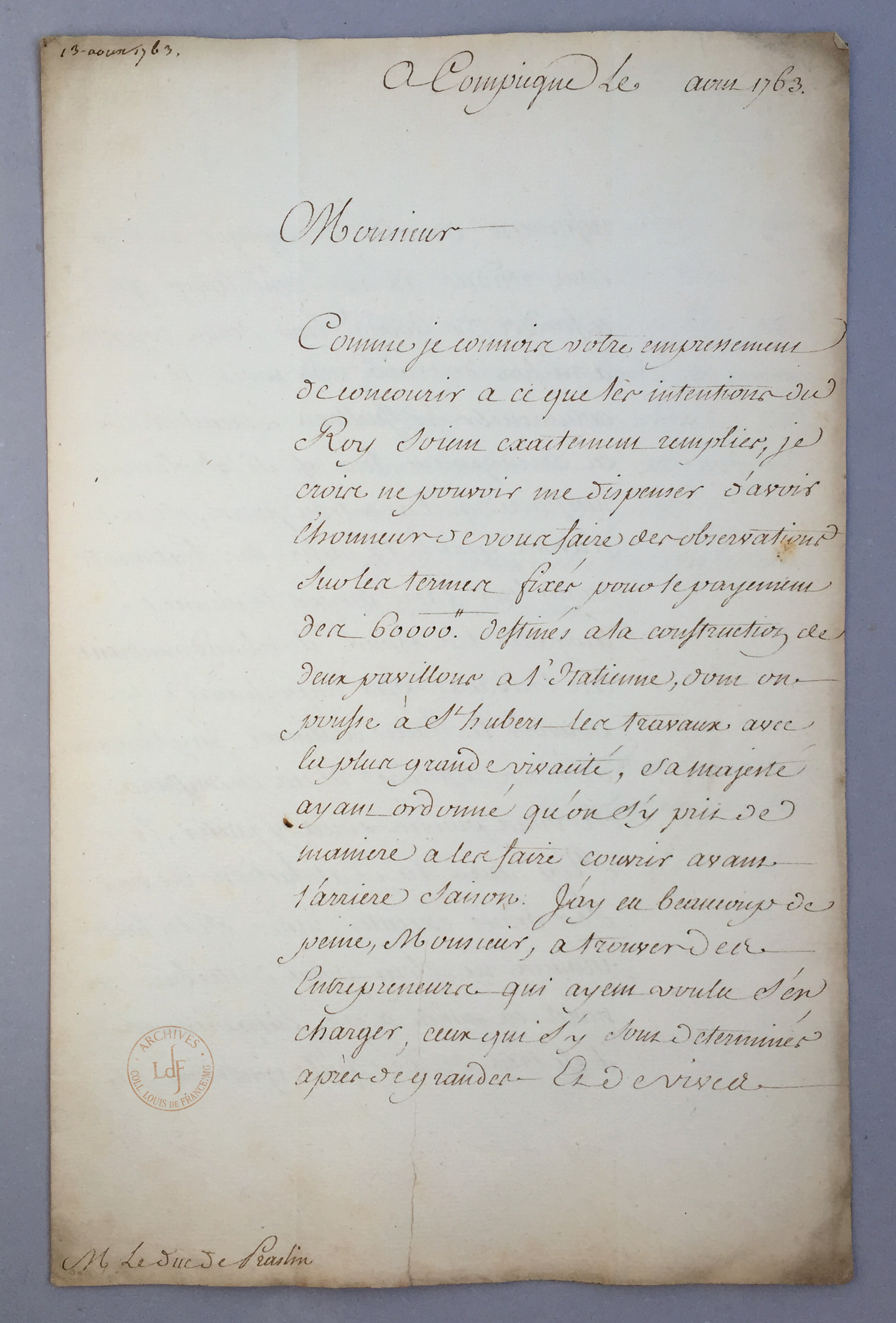 LdF ms BR-0104: Abel-François Poisson de Vandières, marquis de Marigny (1727-1781), directeur général des bâtiments et frère de Madame de Pompadour, favorite du Roi Louis XV. Lettre (non signée/ secrétaire, pour copie) adressée à César Gabriel de Choiseul-Chevigny, duc de Praslin (1712-1785), au sujet de la construction des pavillons à l'italienne du Château de Saint-Hubert (Le Perray-en-Yvelines, domaine royal de Louis XV), sous la direction du Premier architecte du Roi Ange-Jacques Gabriel (1698-1782). Il faut en effet 60000 livres pour la construction de ces pavillons et l’entrepreneur, trouvé avec difficulté, réclame 15000 livres par mois pour pouvoir continuer les travaux. Il a épuisé les caisses pour payer la première partie et demande donc à Praslin de l’aider pour le reste. « Tel est l’Etat déplorable de cette partie du service de Sa Majesté ». _______________